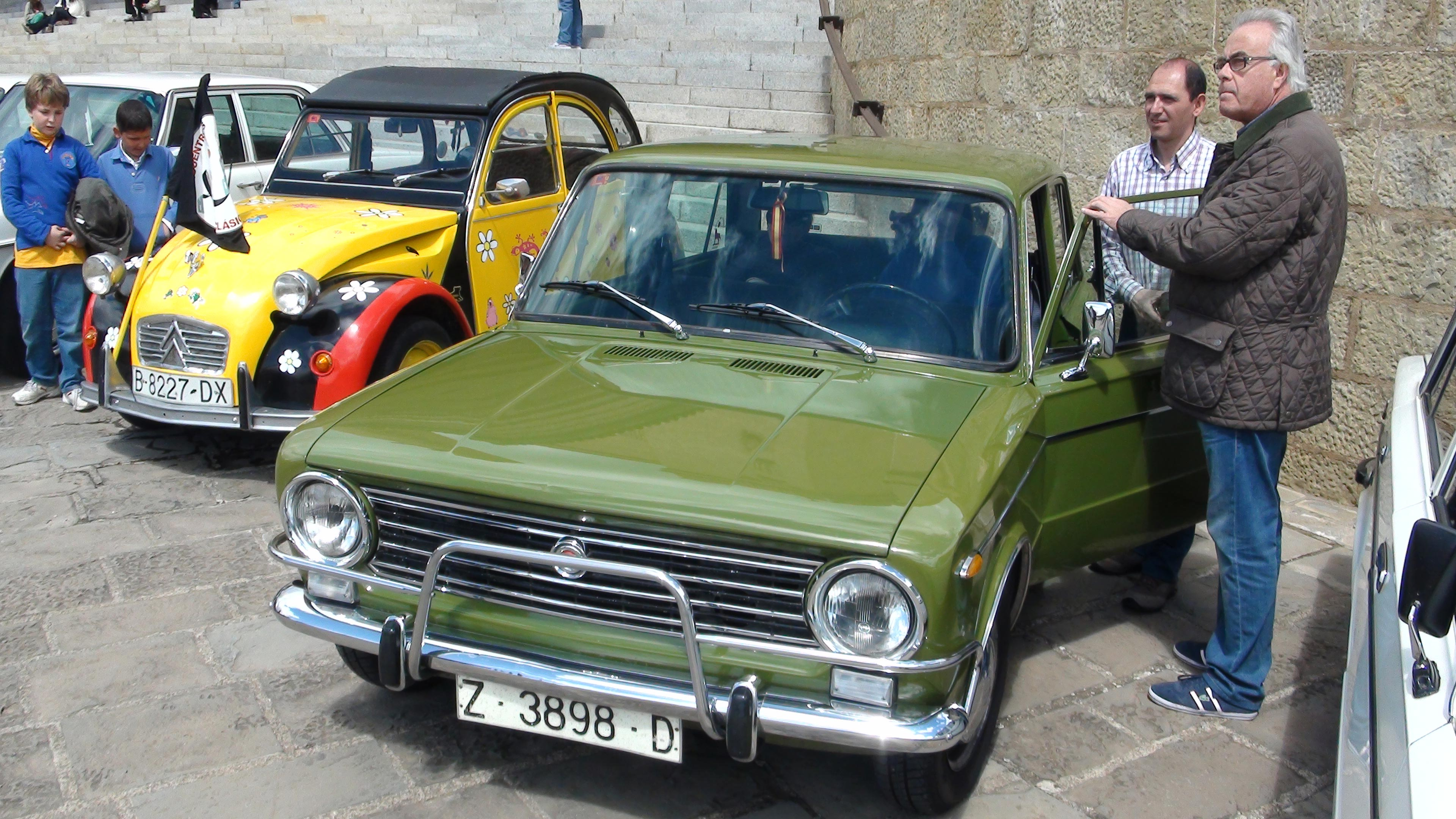 Coches clásicos en Torreciudad - 110